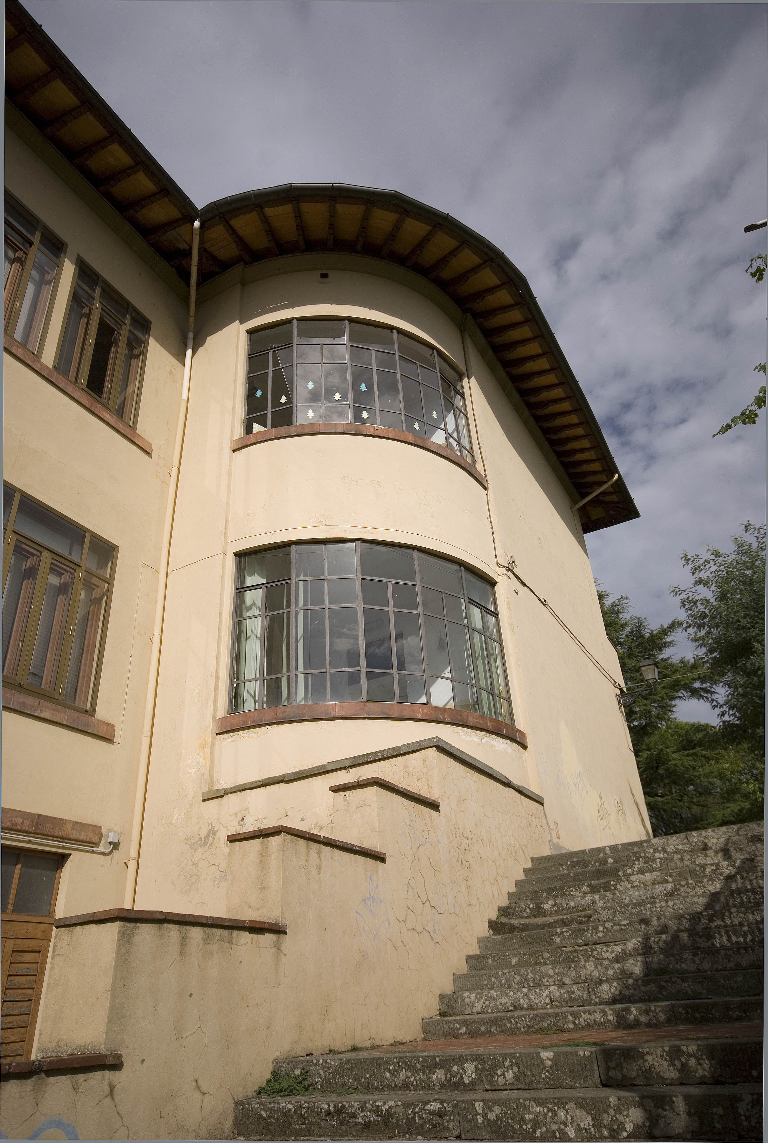 Particolare della Scuola elementare di Impruneta